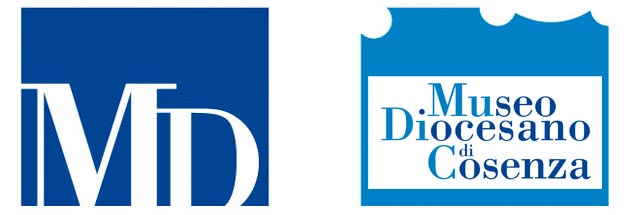 Logo del Museo Diocesano di Cosenza